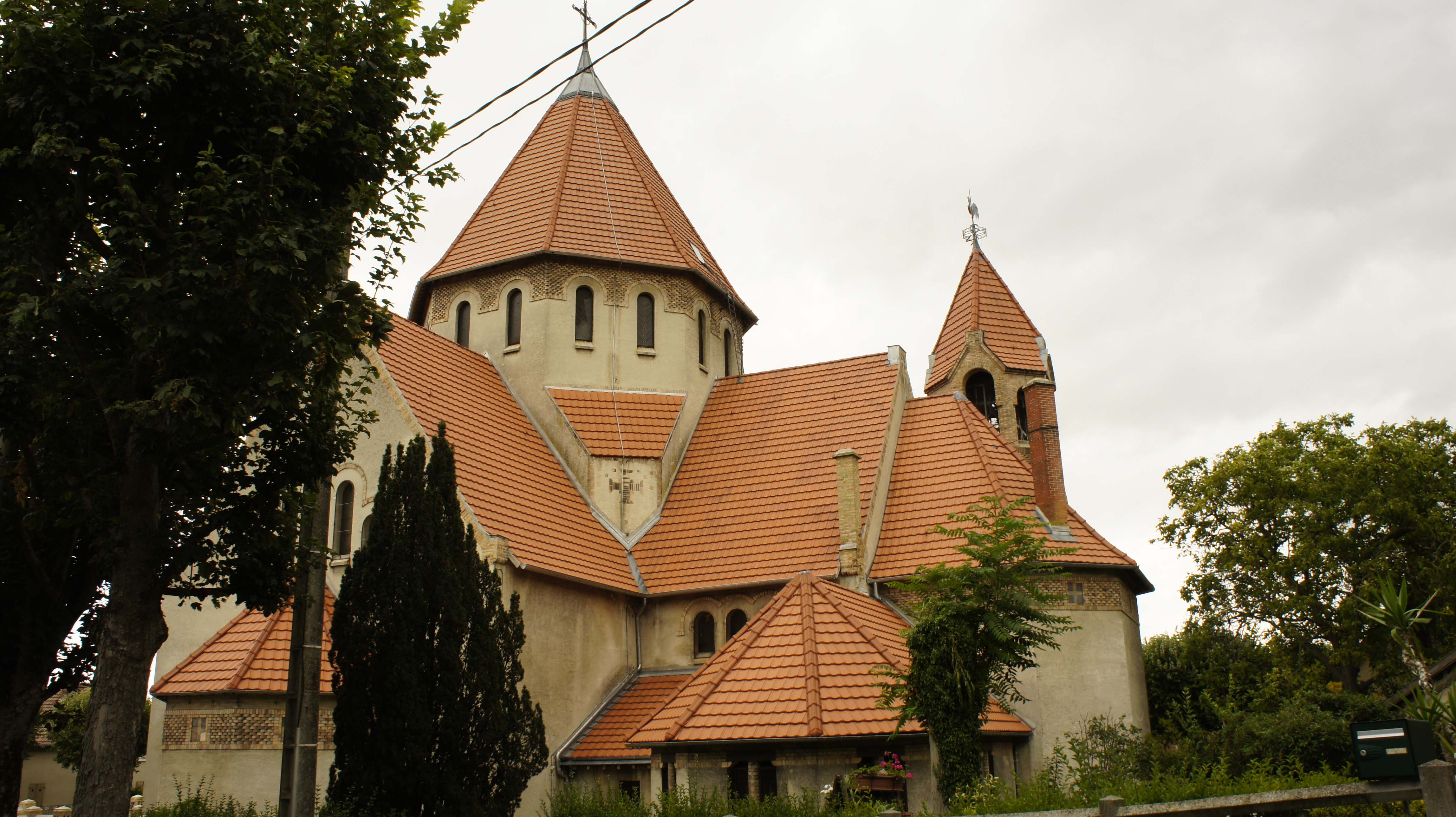 église st-Nicaise du quartier Chemin-vert de Reims vue par le sud est. Construite en 1923 par J-M Auburtin et Dufay-Delamy architectes, peintures par Berque, Denis et Laurent, maître verrier R.Lalique. Fiche PA00078784 sur la base Mérimée et moniment classé en 2002. .